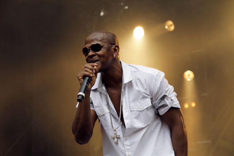 Mr. Vegas, live at Ruhr Reggae Summer 2010